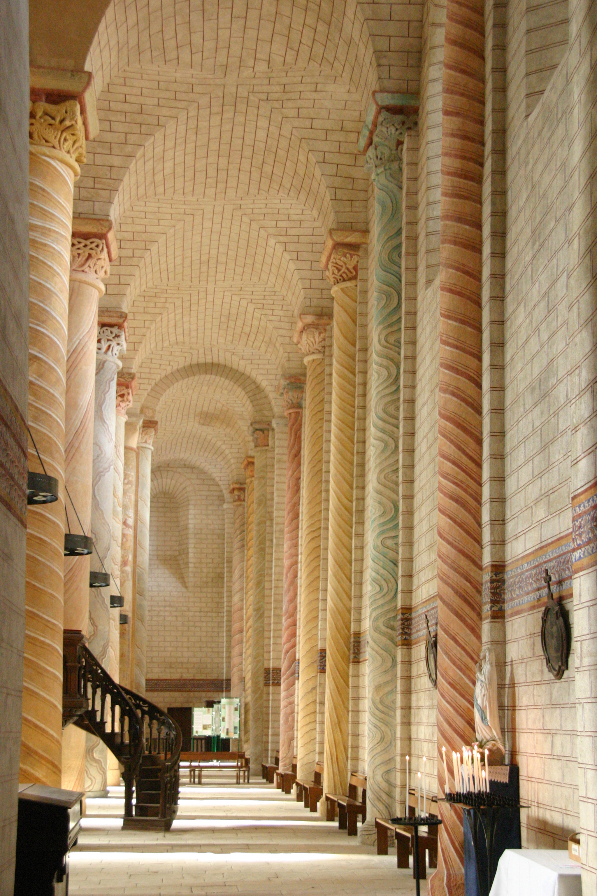 Abtei-Kirche Saint-Savin-sur-Gartempe